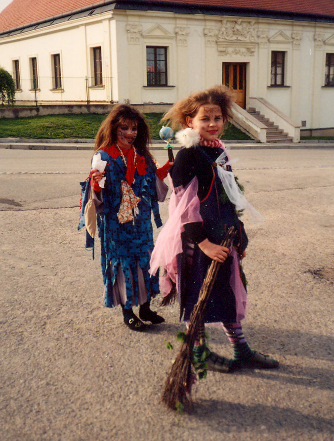 Photo personnelle prise en Tchéquie (Valdice) le 30 avril 1998. No copyright.